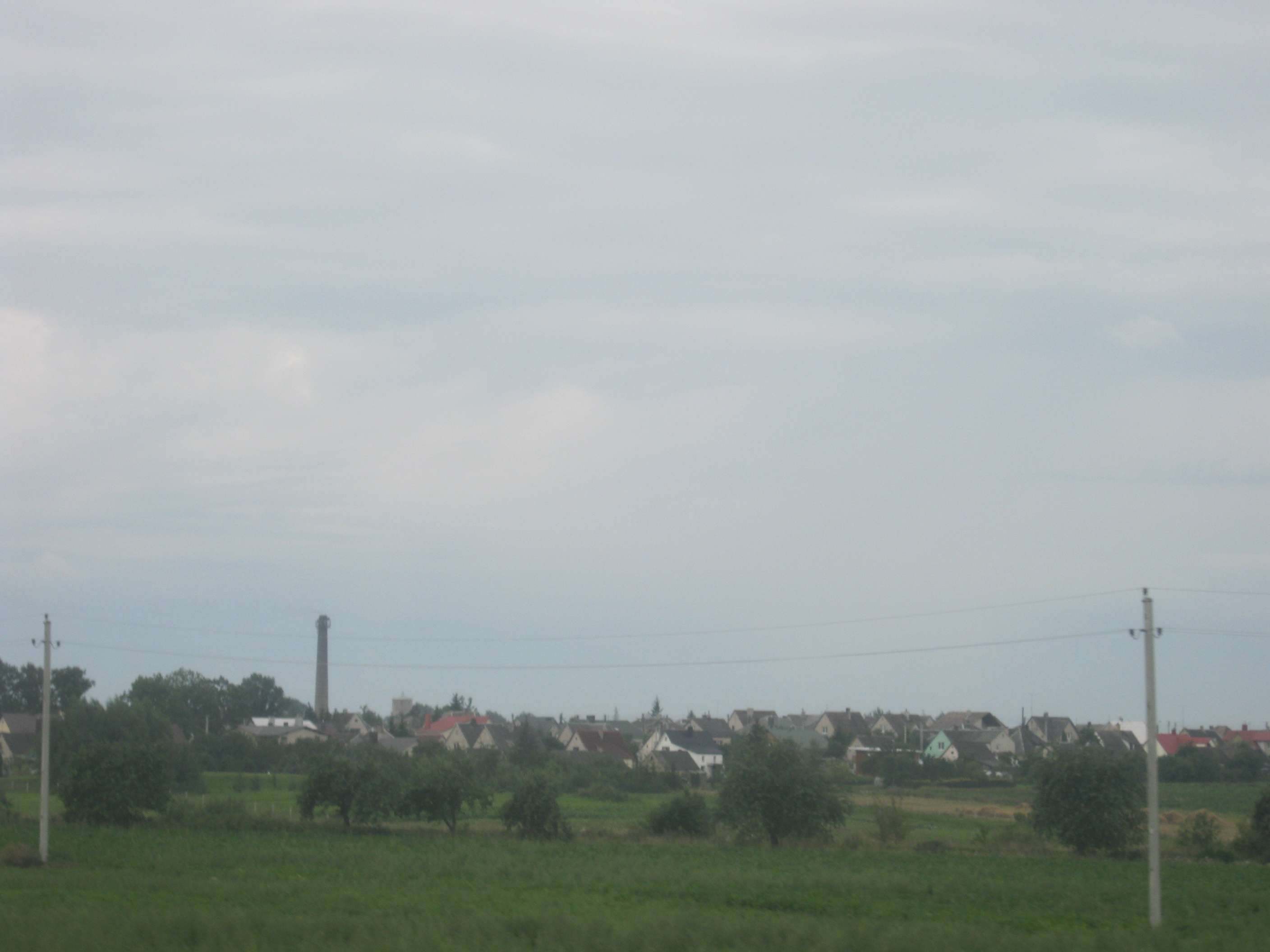 Kalvarija